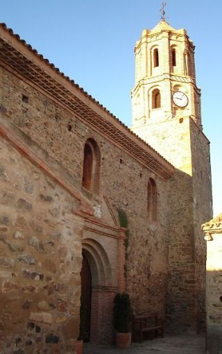 Alcalá de Moncayo Church